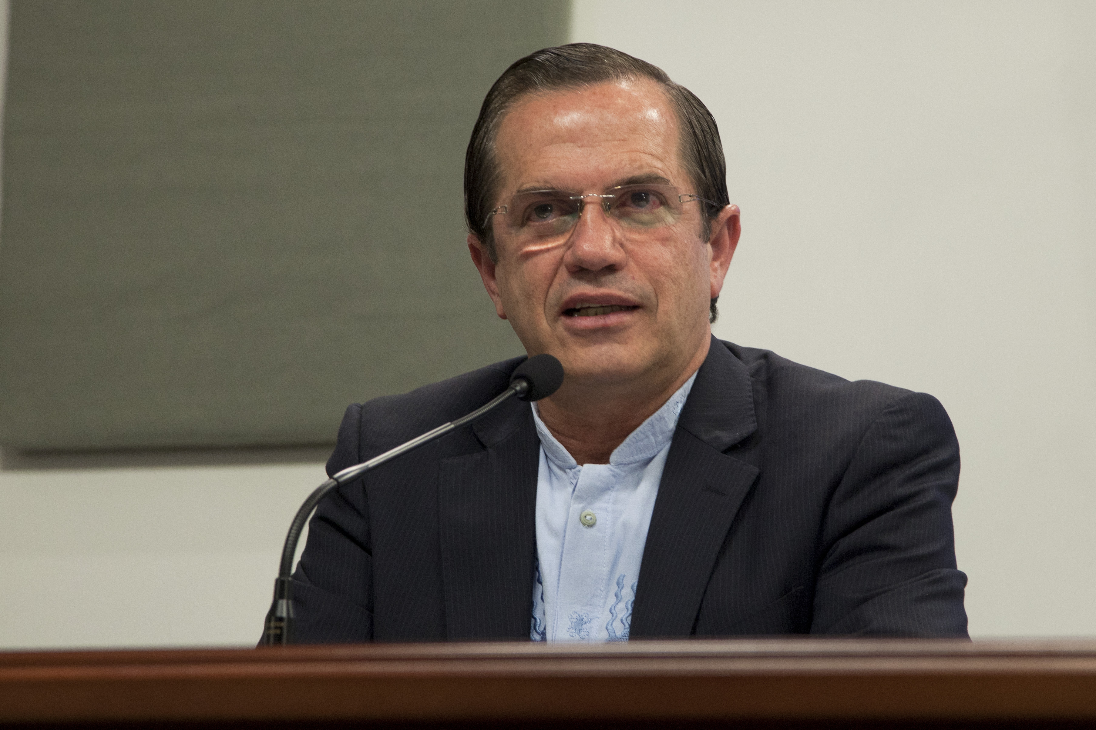 Quito (Ecuador), 16 de Agosto 2012. El Canciller Ricardo Patiño, en rueda de prensa, comunicó la decisión de Ecuador de conceder asilo político a Julian Assange.